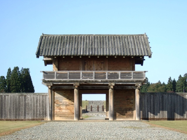 払田柵跡外柵南門 Hotta Wall, Akita, Japan 2006年10月18日、投稿者本人の撮影。